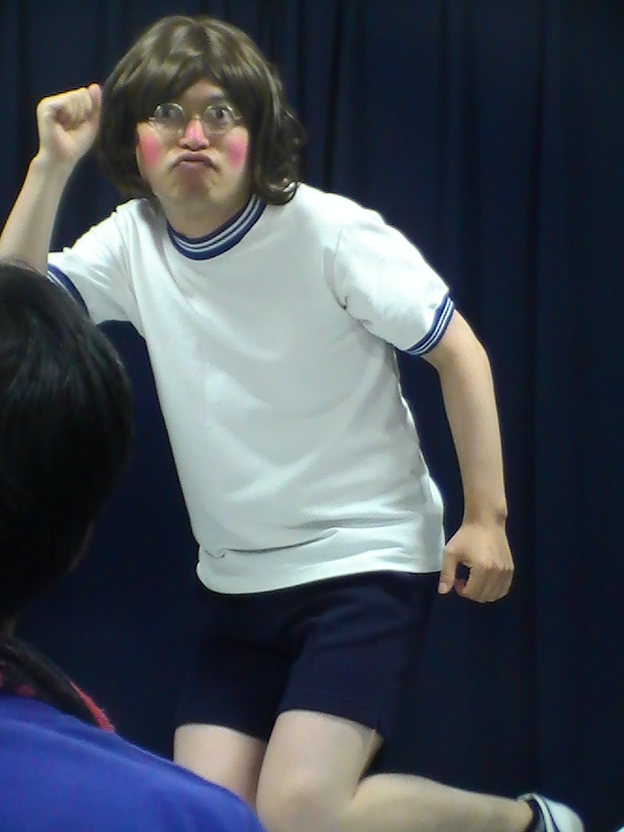 脳みそ夫 (2016年8月)